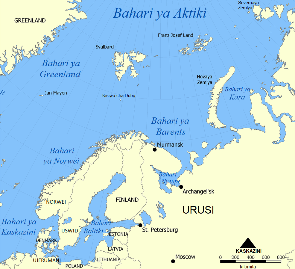 Kiswahili: Ramani ya Bahari ya Barents kwenye Bahari Antaktiki